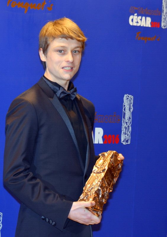 Rod Paradot à la cérémonie des César